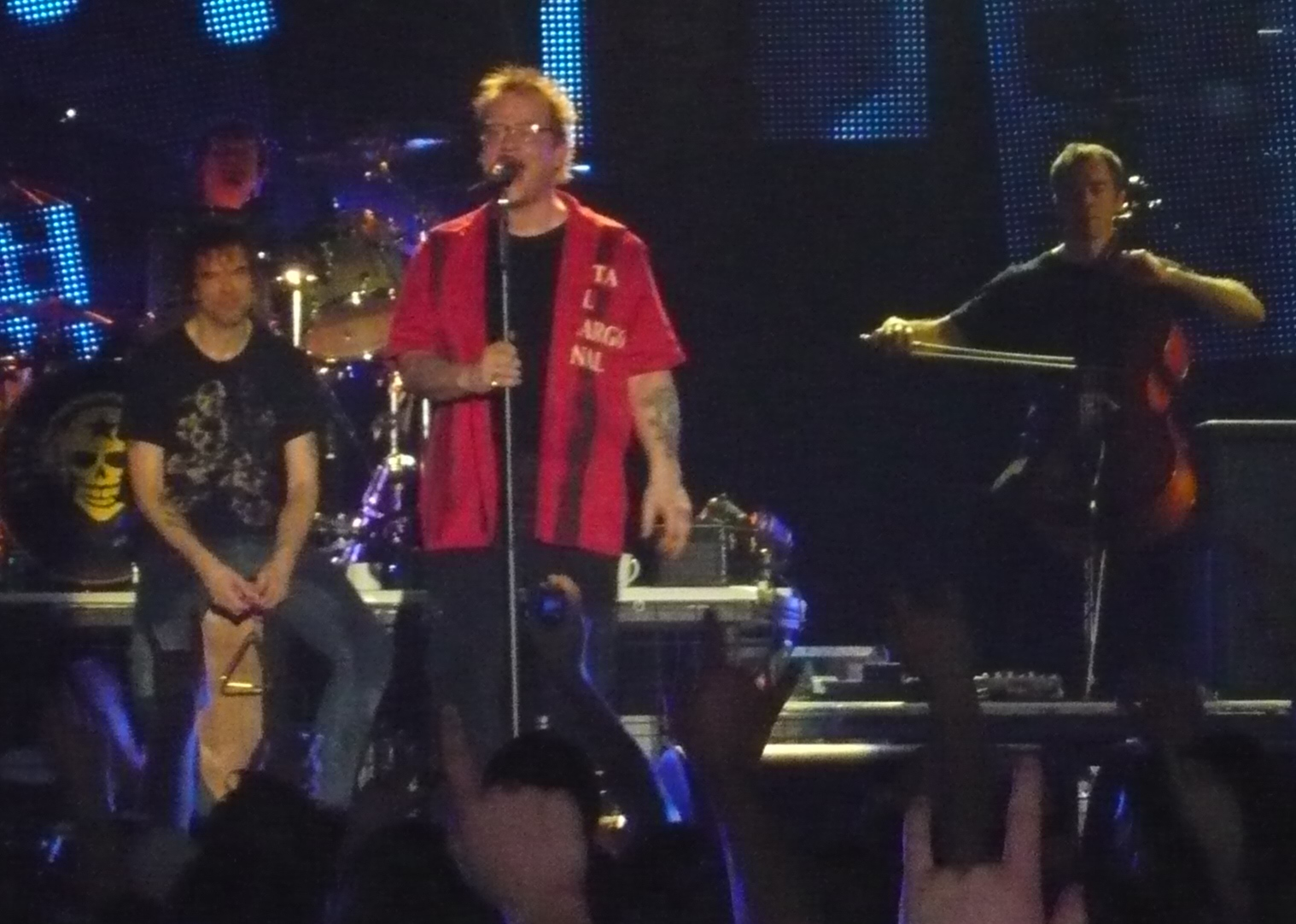 Kuddel von den Toten Hosen singt Stil, still, still während eines Konzertes in Freiburg